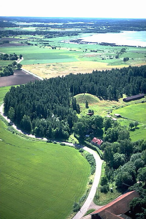 Nordians hög (fornlämningsnummer, RAÄnr 0057:31), i bildens mitt, och sjön Fysingen. Motiv: Åshusby Nyckelord: Flygbilder, Raä-Fastigheter, Riksintressen Kategori: Miljöer, Odlingslandskap Nordians hög (fornlämningsnummer, RAÄnr 0057:31), i bildens mitt, och sjön Fysingen.